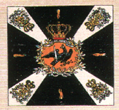 Truppenfahne preußischen 8. Grenadier-Regiments (Linie)